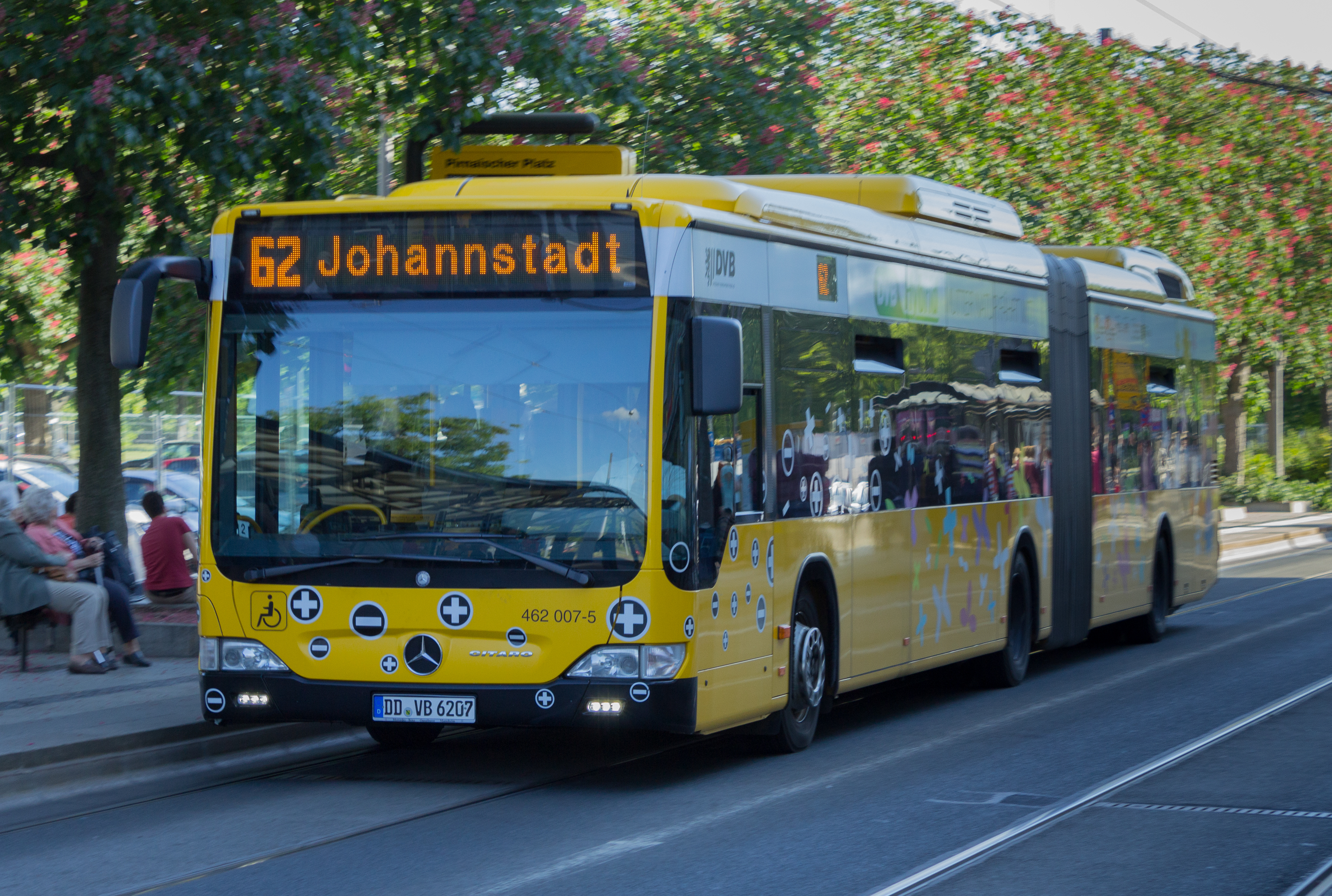 DVB Hybriedbus 462 007-5 Linie 62 richtung Johannstadt Dresden am Pirnaischen Platz